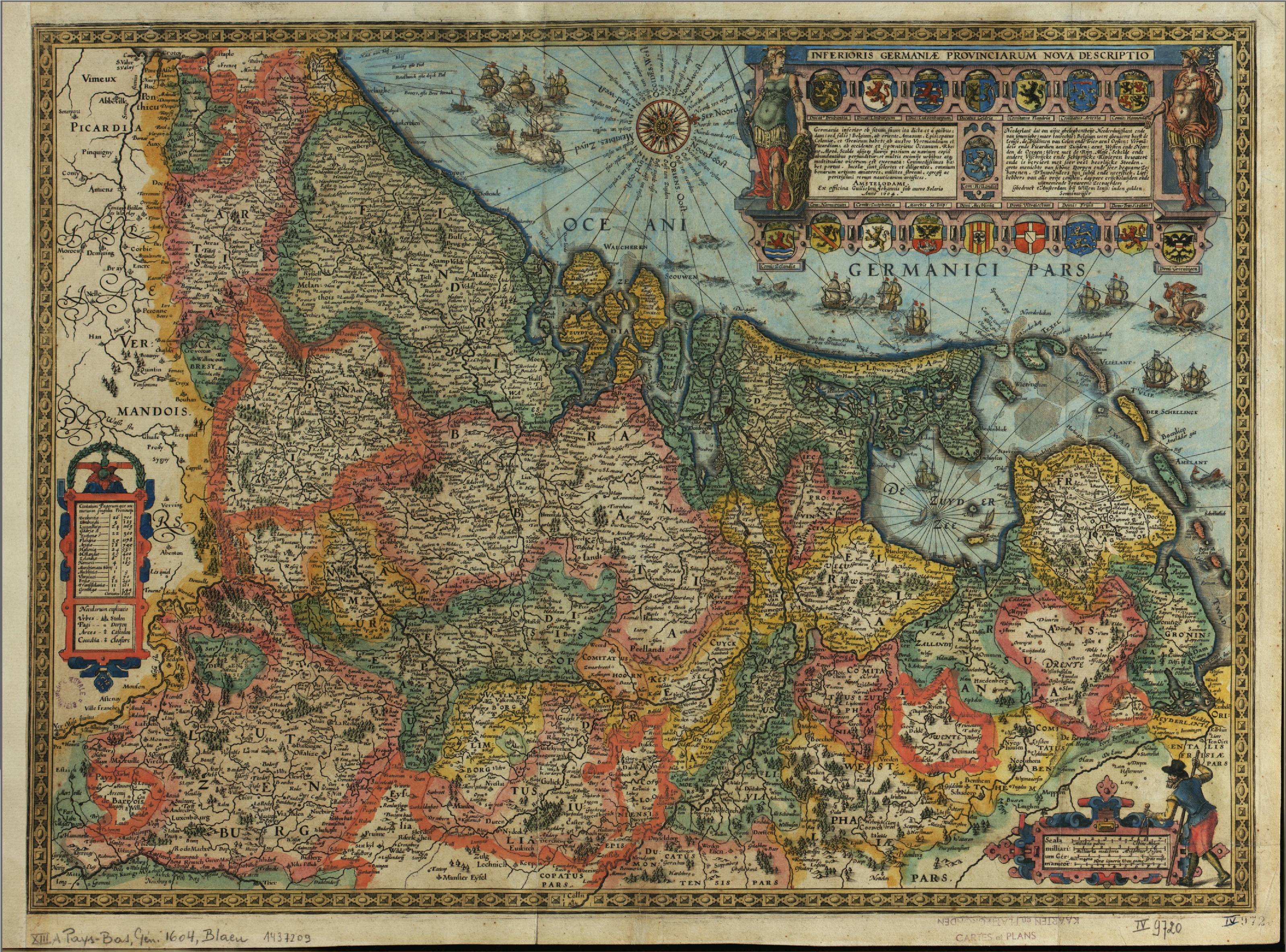 Oudste op 't internet te vinden kaart van Willem Blaeu